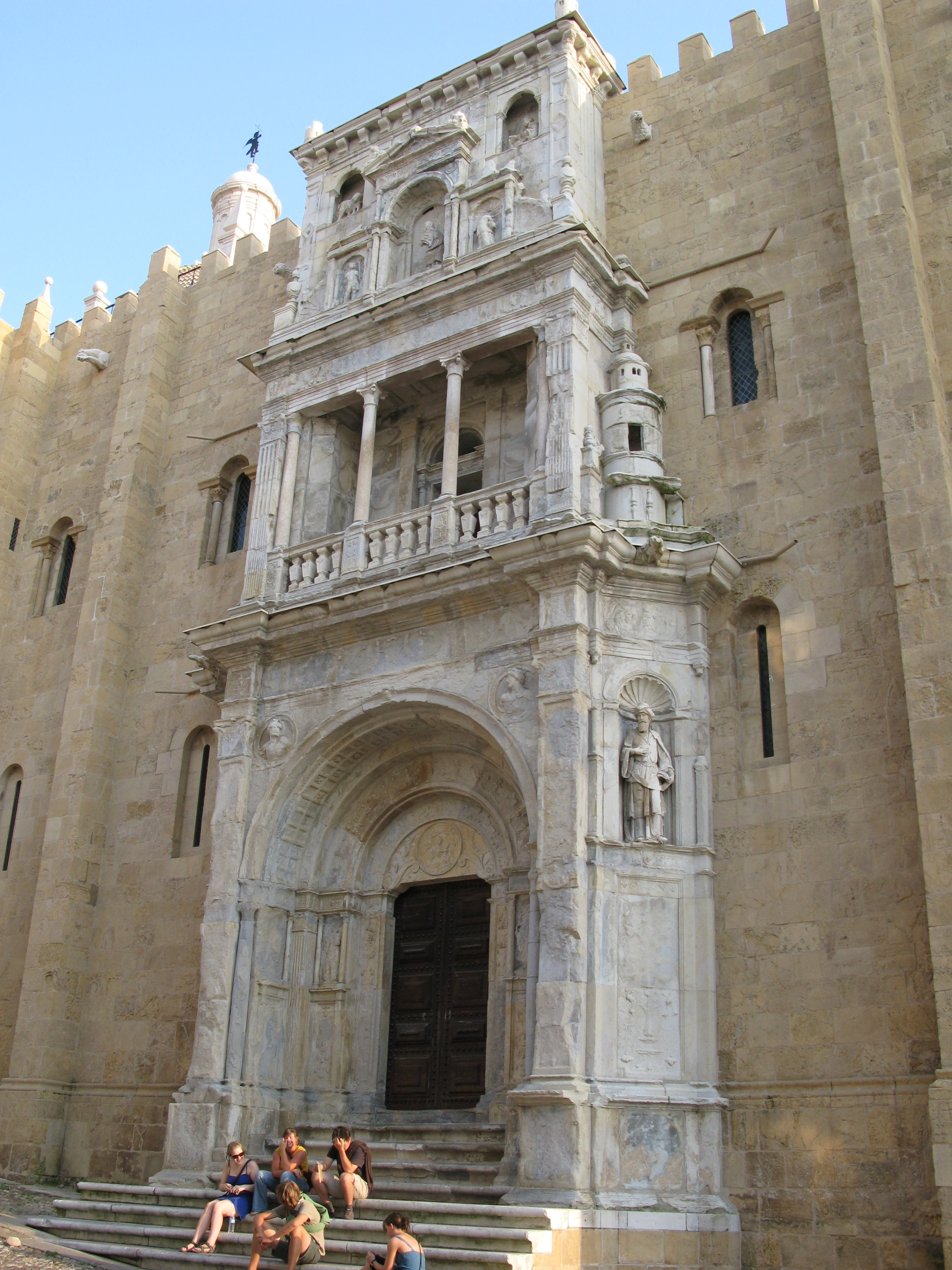 Renaissance Porta Especiosa of the Old Cathedral of Coimbra, Portugal